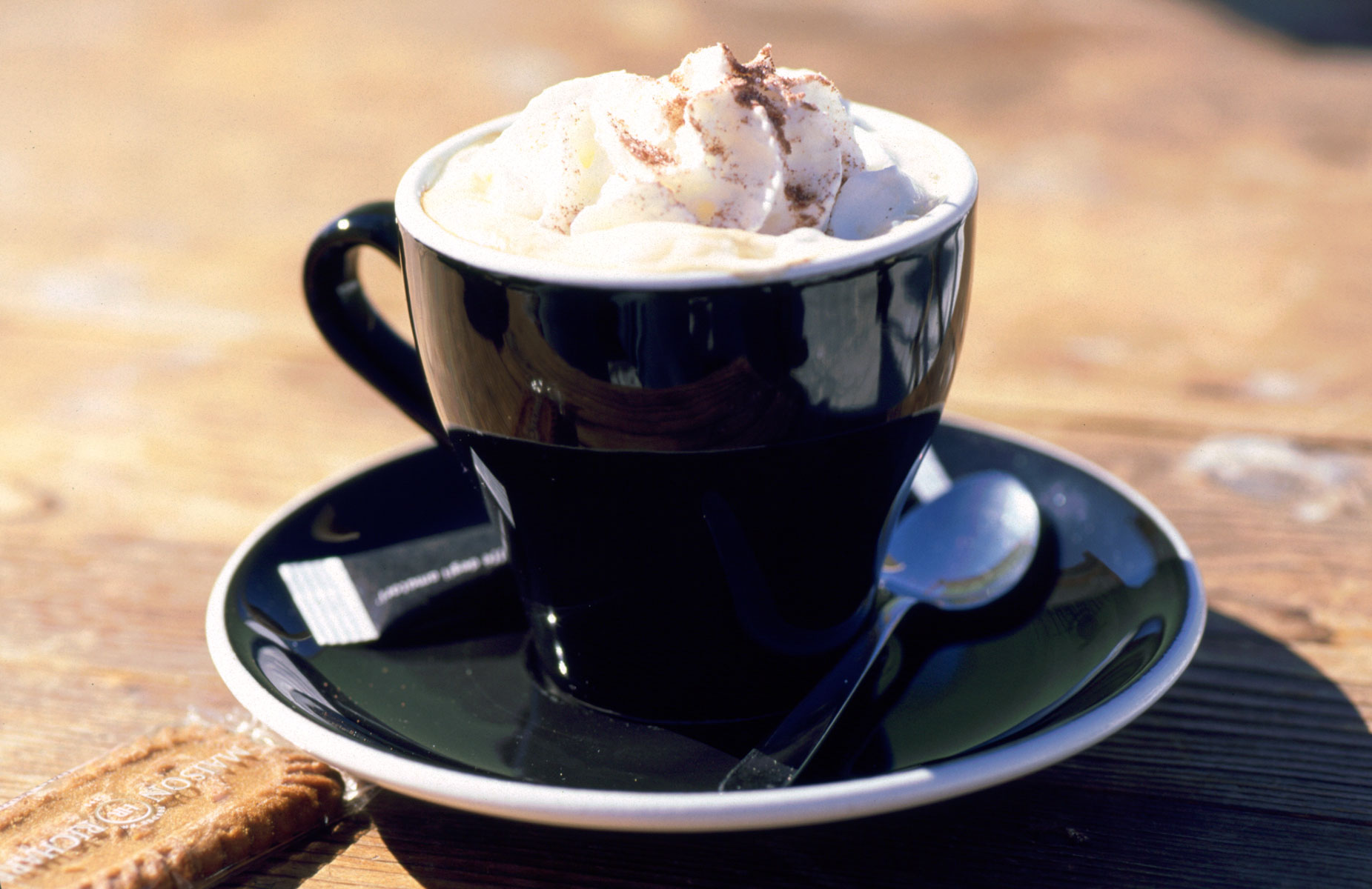 A cappuccino.